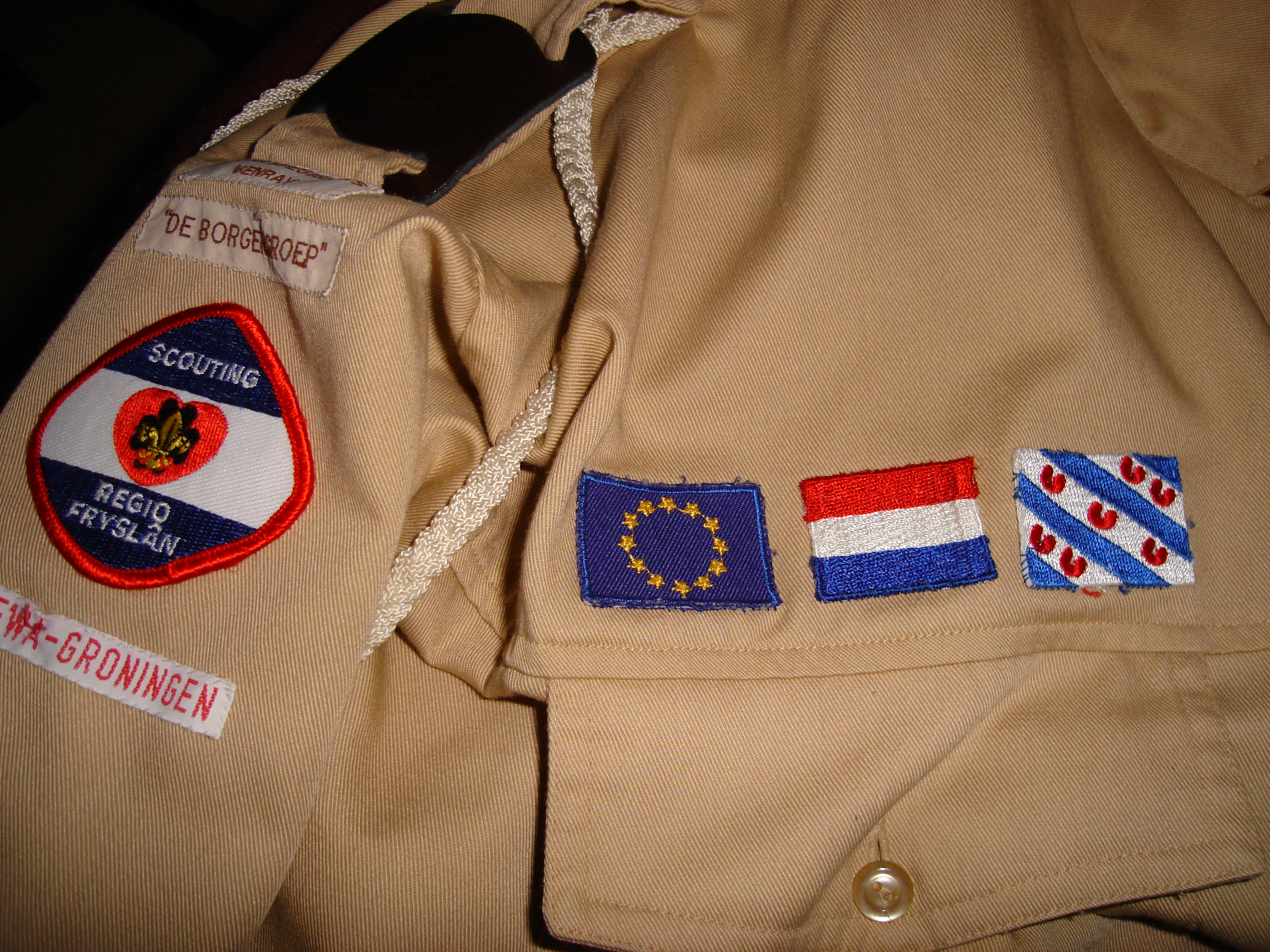 Skoutingunifoarm út Fryslân